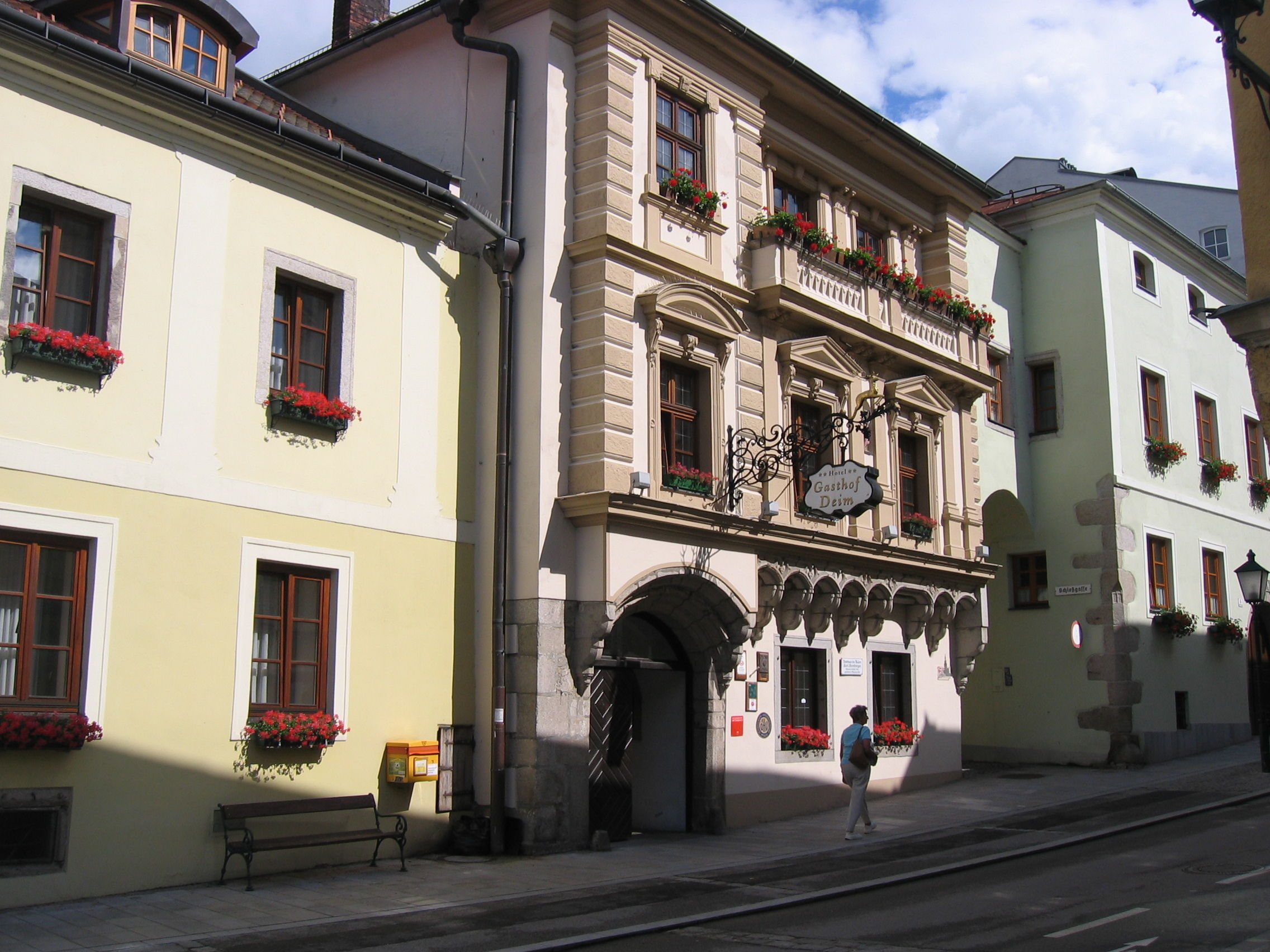 Hotel Daim und Geburtshaus des Malers Kronberger